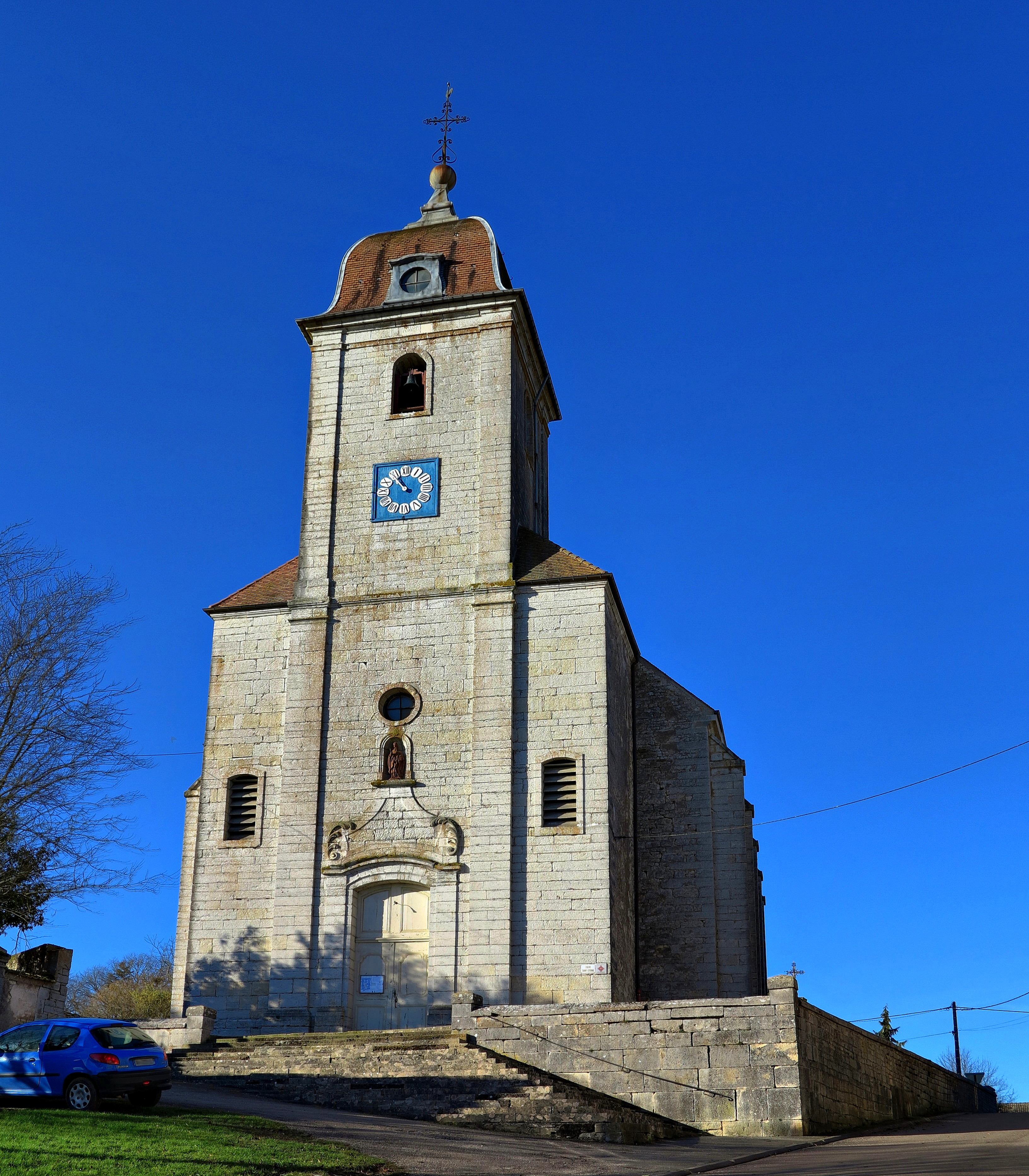 Église Saint-Étienne d'Avrigney-Virey